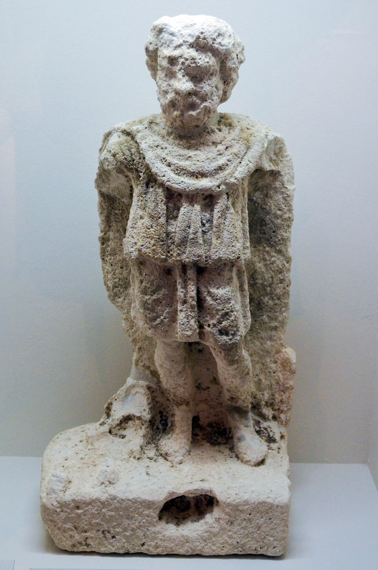 Statuette de Sucellus, trouvée en 1930 dans une citerne du clos du Verbe incarné. H 65 cm, largeur 30,5 cm, calcaire coquiller. Musée gallo-romain de Fourvière, inventaire 2001-0-399, Lyon. Catalogue archéologique de la Gaule, Lyon 69/2, p. 549